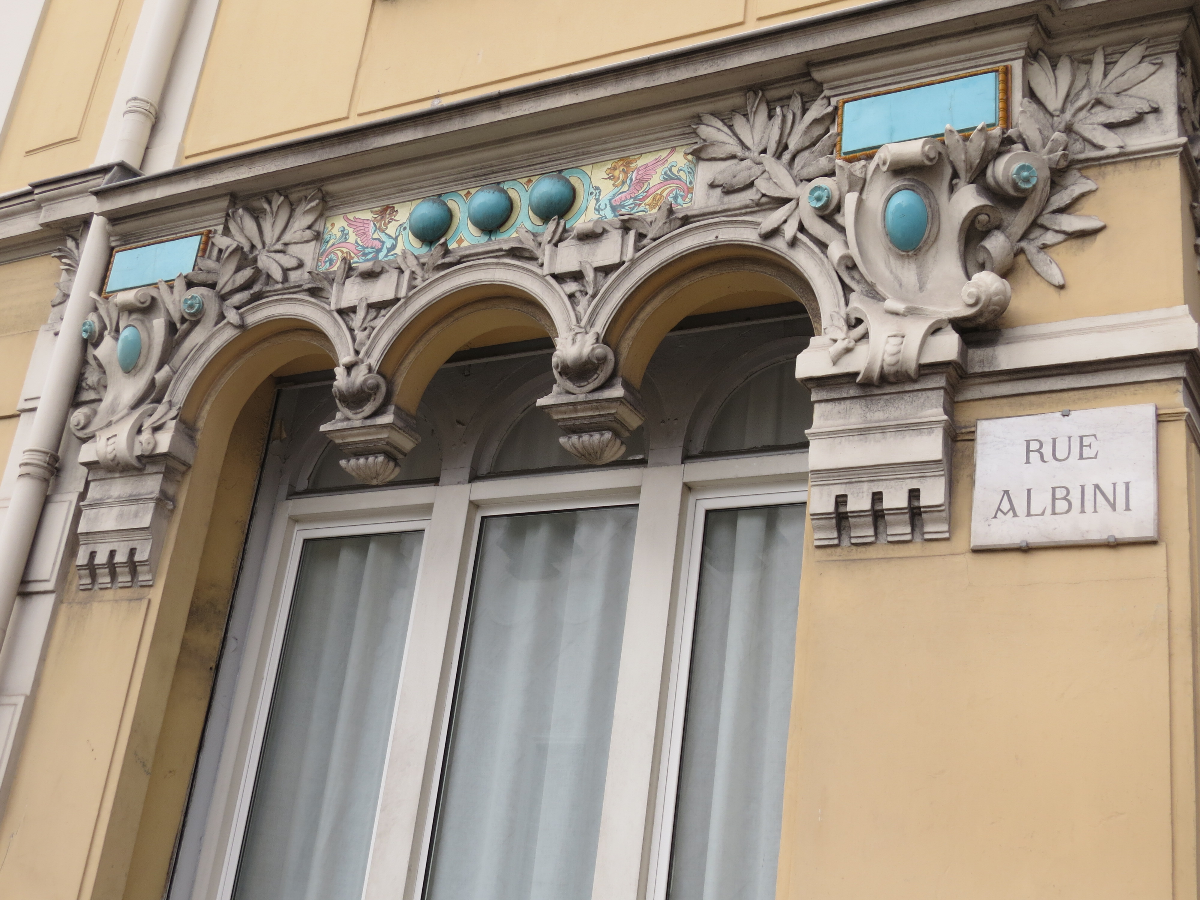 Menton decorated window